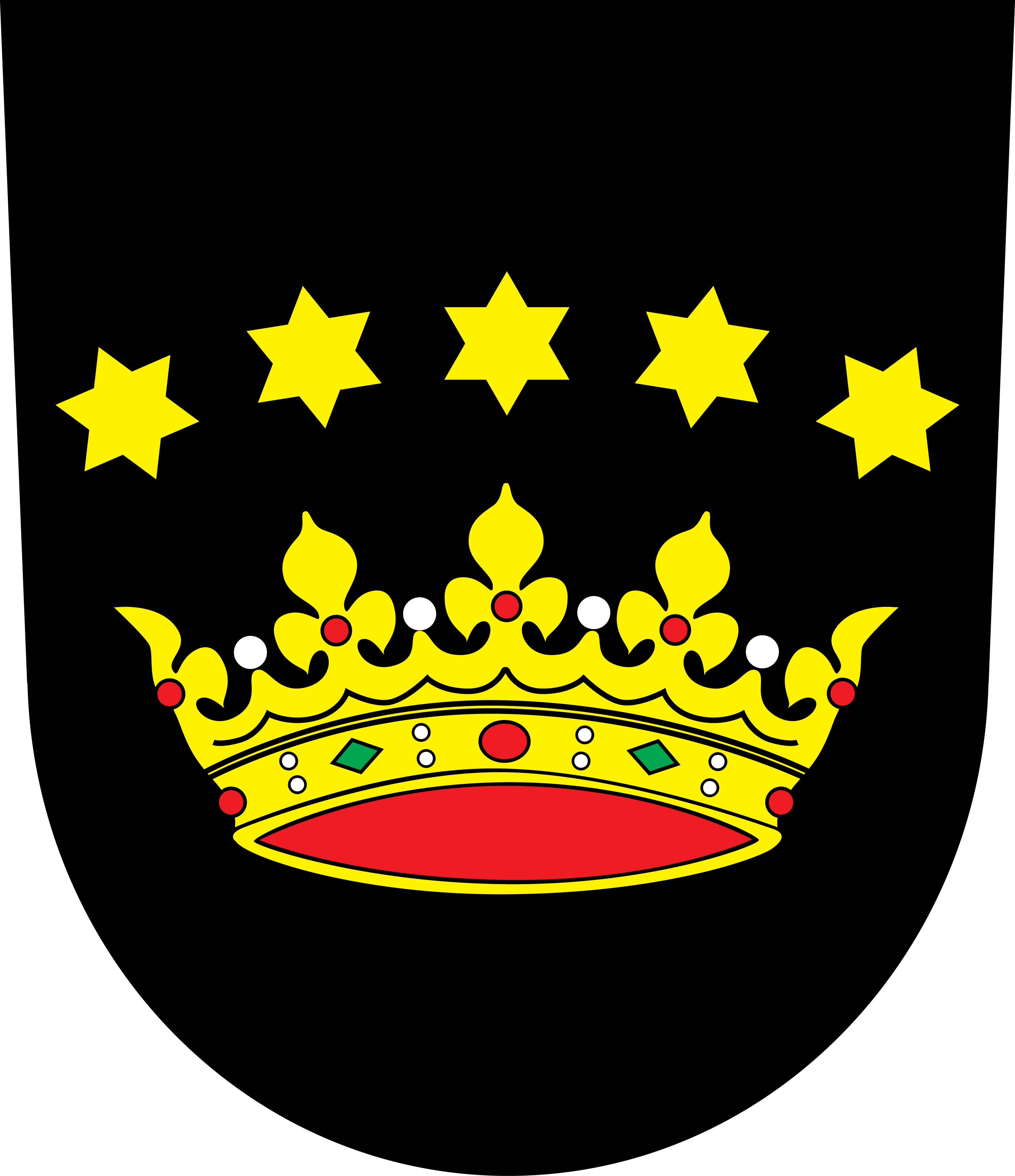 znak obce Jankov (okres Benešov).